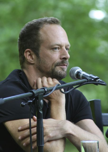 Der Schriftsteller Gunther Geltinger auf dem Erlanger Poetenfest 2013 bei der Vorstellung seines Romanes "Moor".